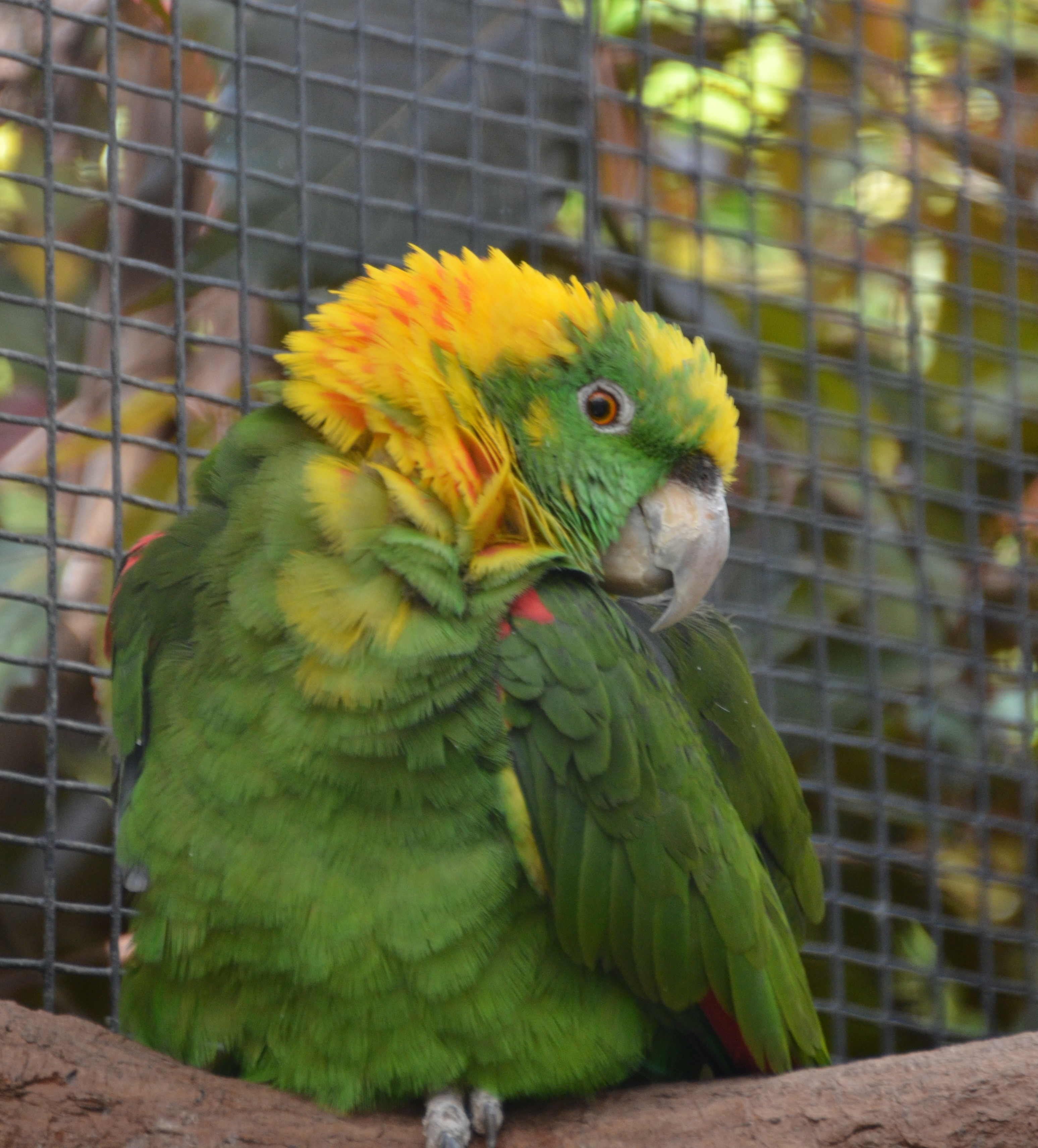 Roatán-Gelbnackenamazone (Amazona auropalliata caribaea)